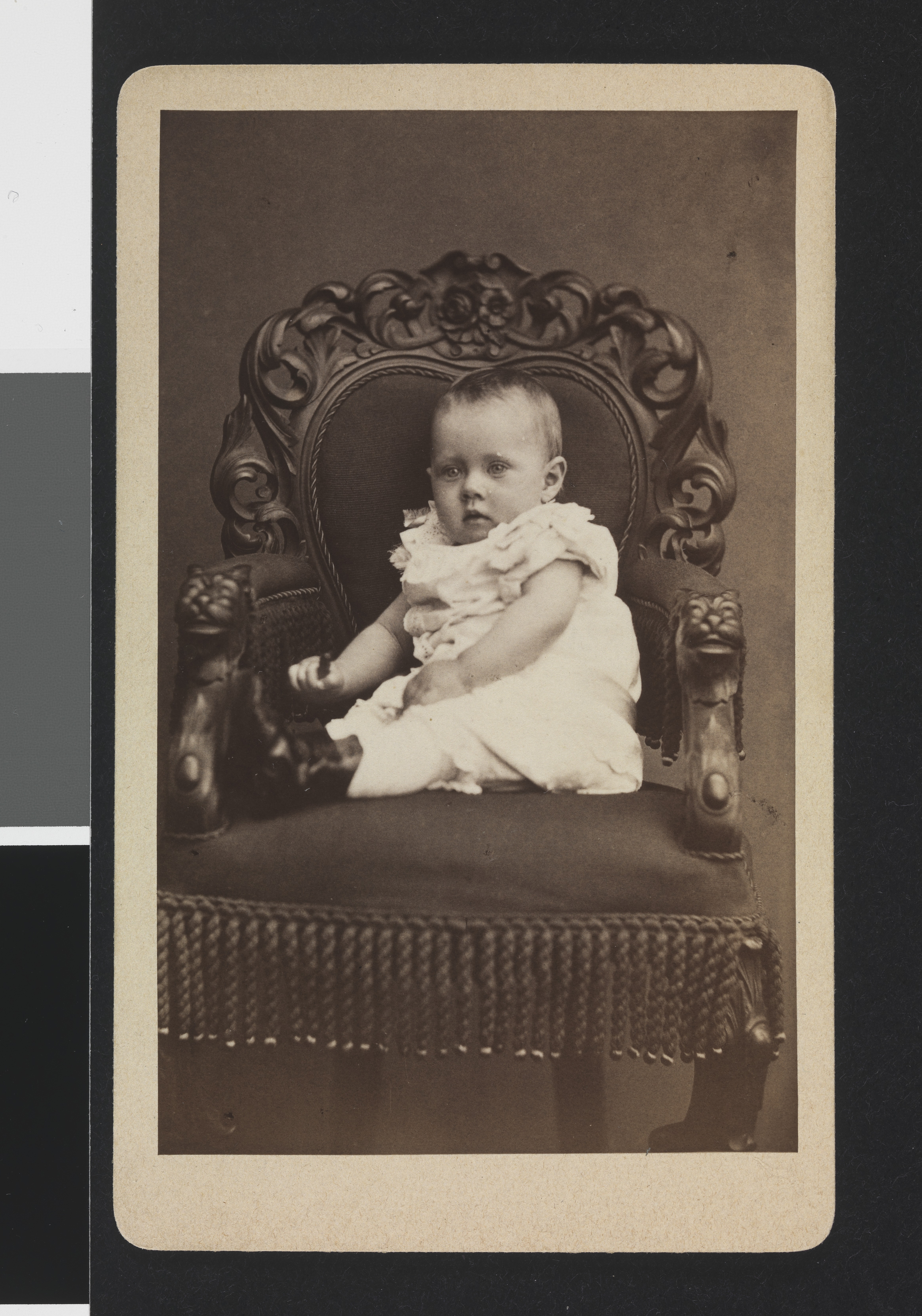 Barnebilde av Walborg Bølling. Depicted person: Bølling, Walborg Depicted place: Oslo